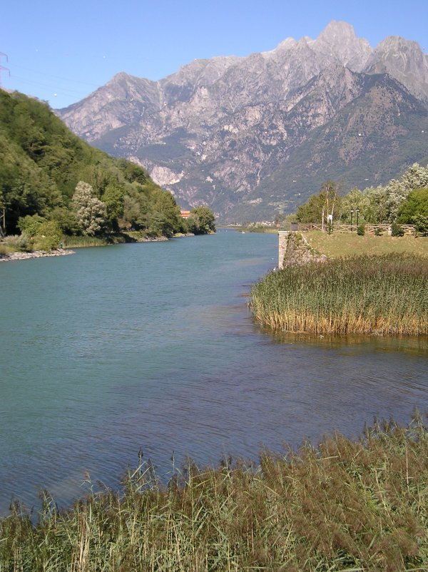 L'Adda vue de l'extremité nord du Lario, branche du lac de Collico.